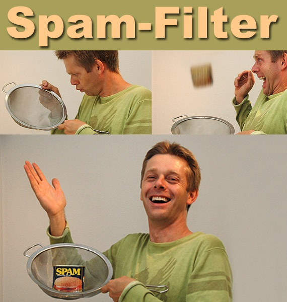 Spamfilter